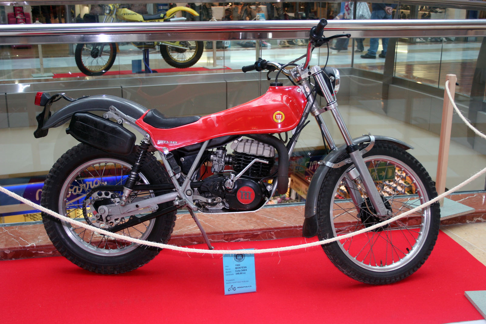 Montesa Cota 349/4, 1982.jpg 349,60 cc.